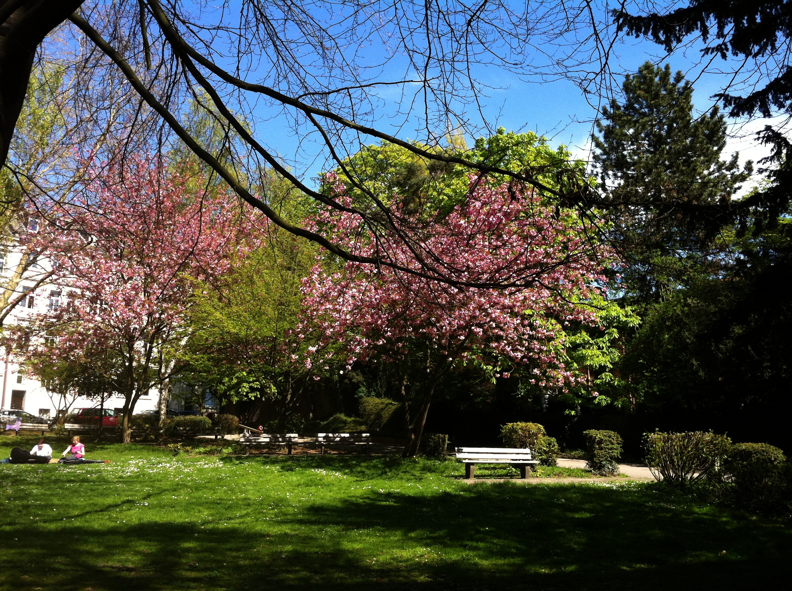 Impressionen aus dem Sandkaulpark Im Frühjahr